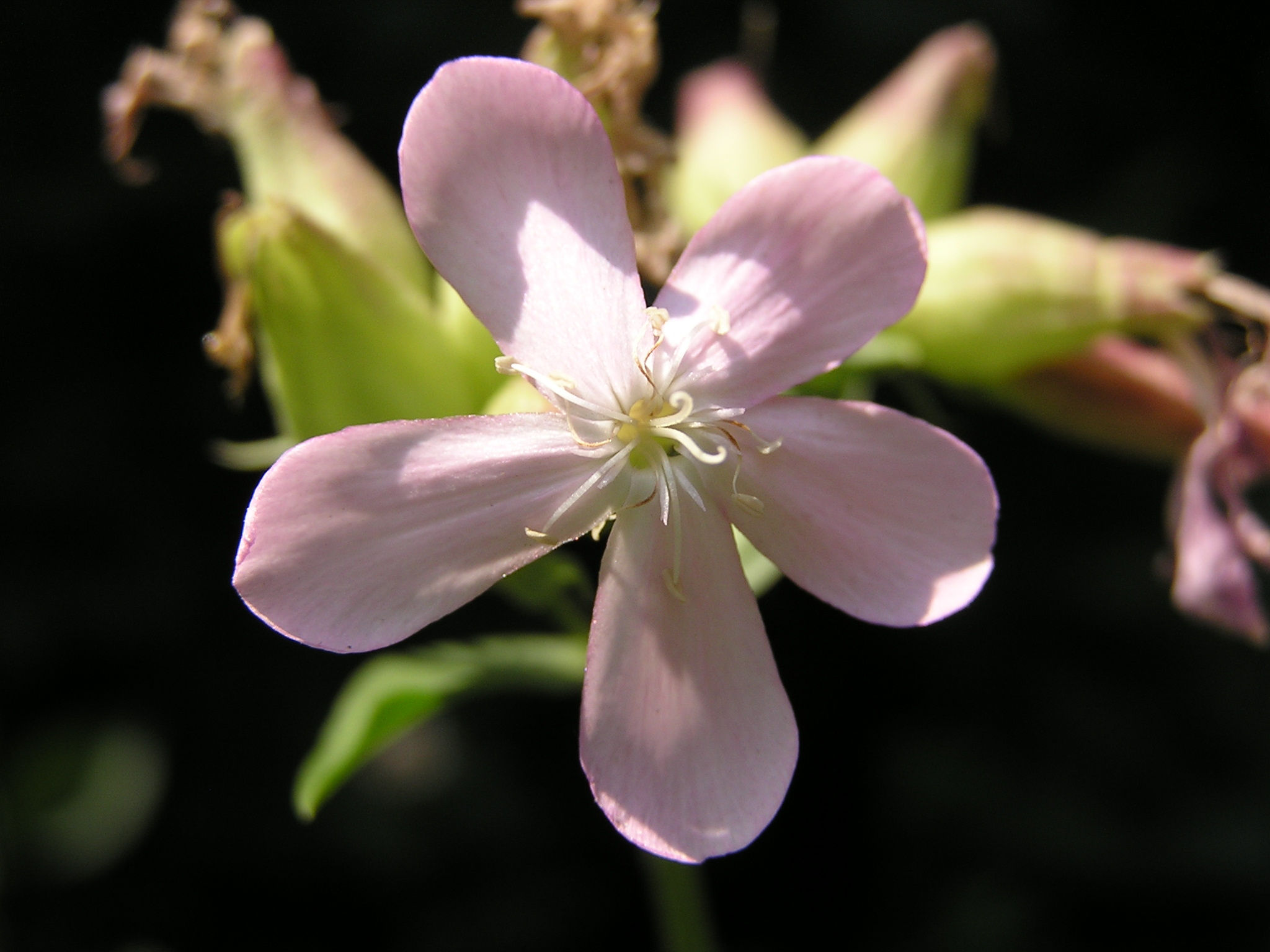 Растение